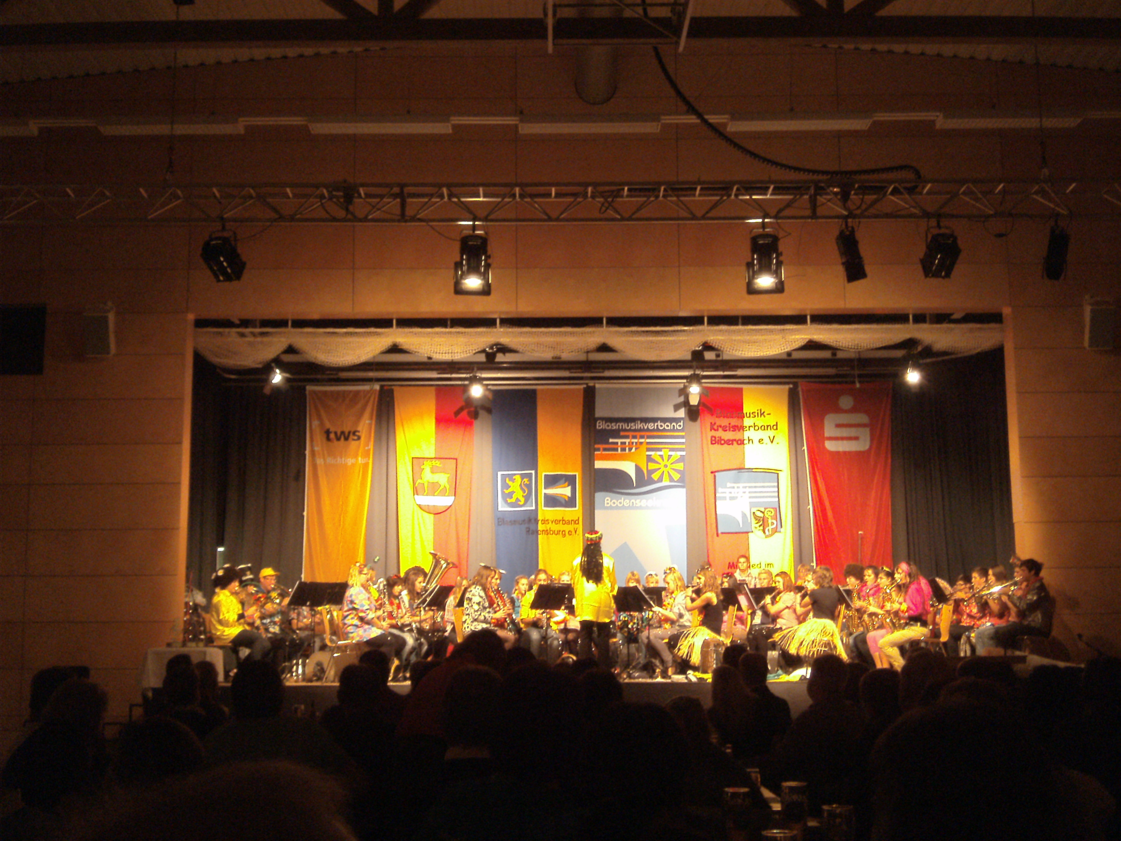 Jugendkapelle Winterstettenstadt/Winterstettendorf beim Oberschwäbisches Jugend-Blasmusikfestival 2011 in Wilhelmsdorf (Riedhalle)